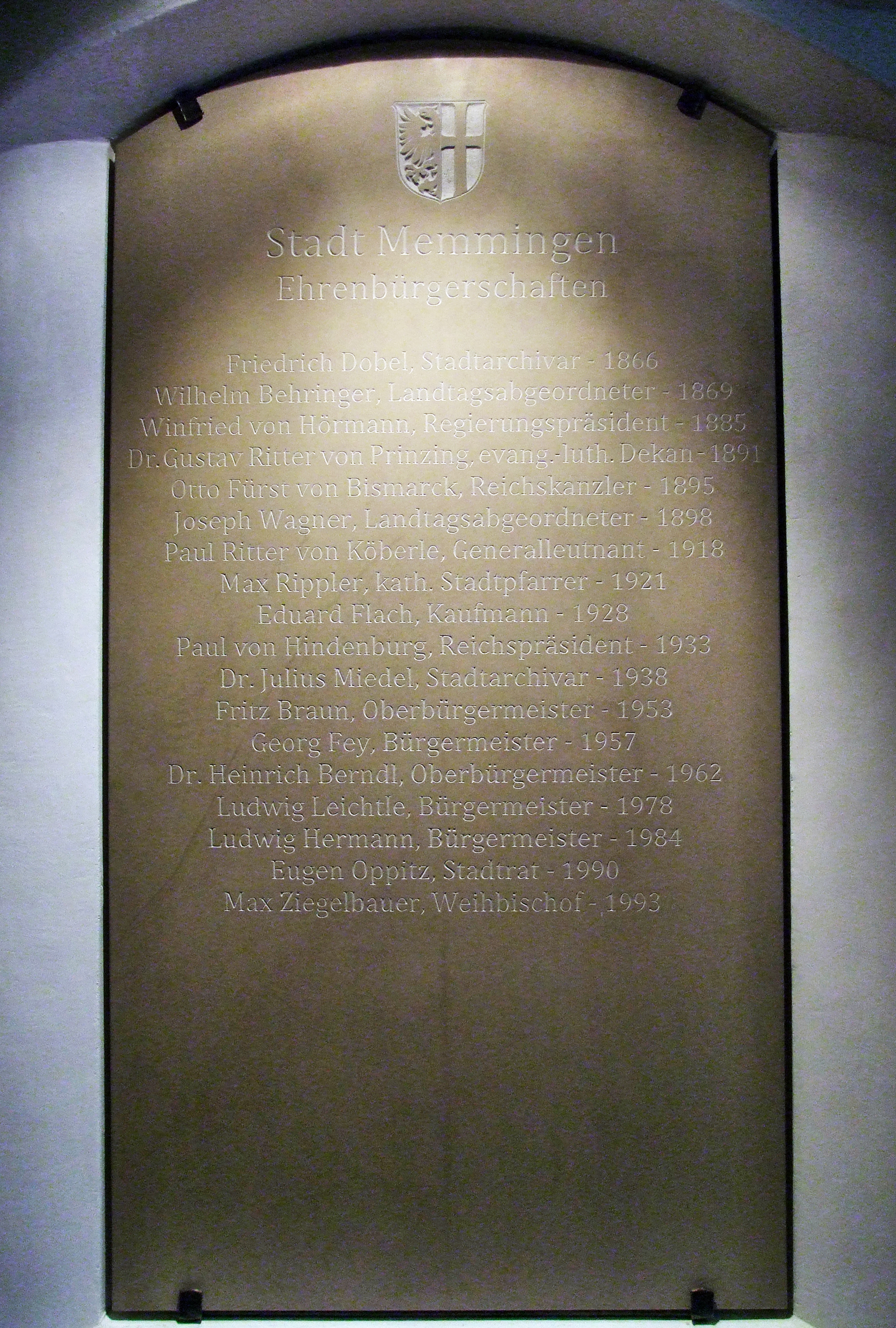 Tafel mit den Memminger Ehrenbürgern (2009) im ersten Stock des Rathauses